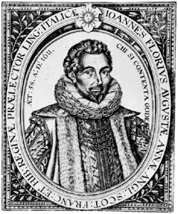 Florio, engraving by William Hole, 1611 Courtesy of the trustees of the British Museum